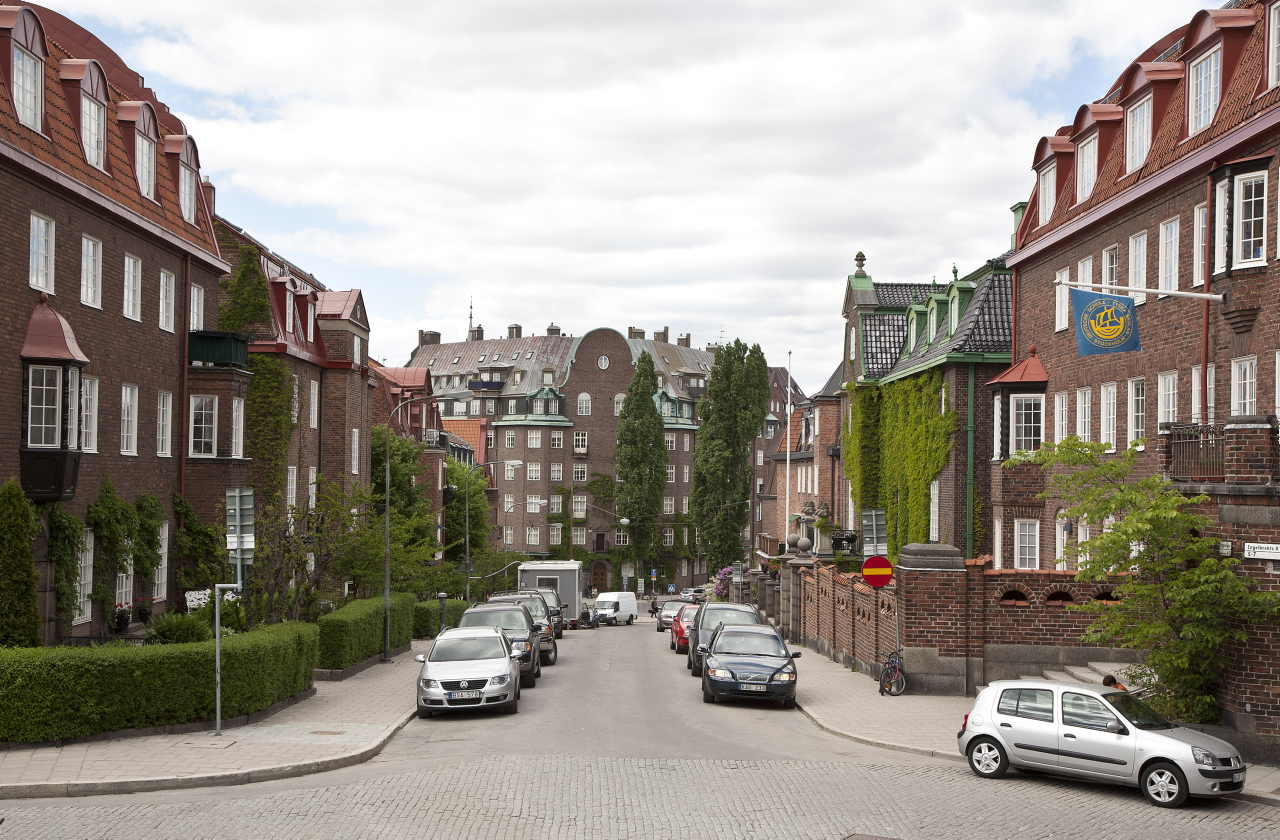 Bragevägen sedd från korsningen med Engelbrekts Kyrkogata.